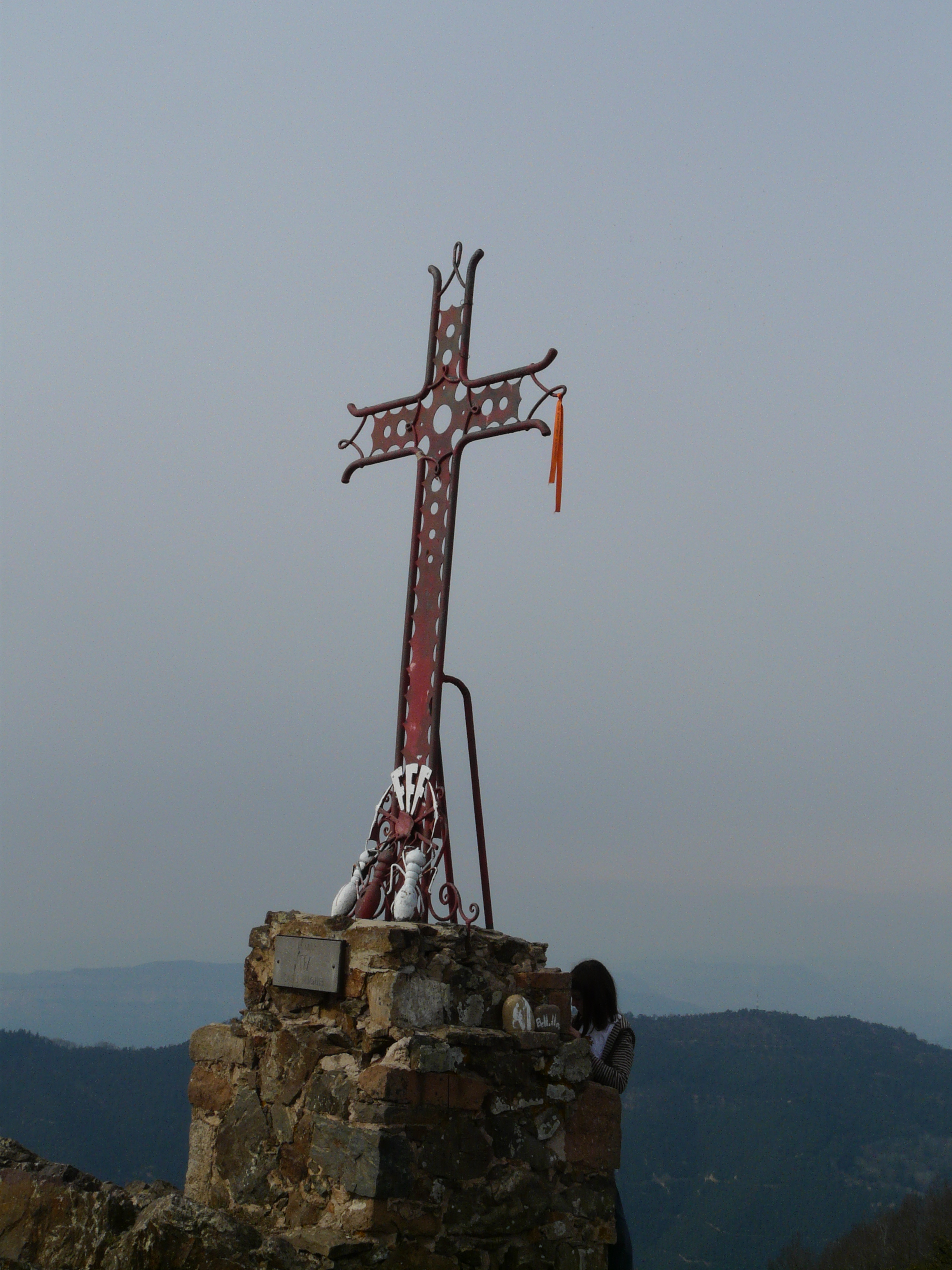 Castell de Solterra (Sant Hilari Sacalm) Object location41° 55′ 23.39″ N, 2° 31′ 58.69″ E